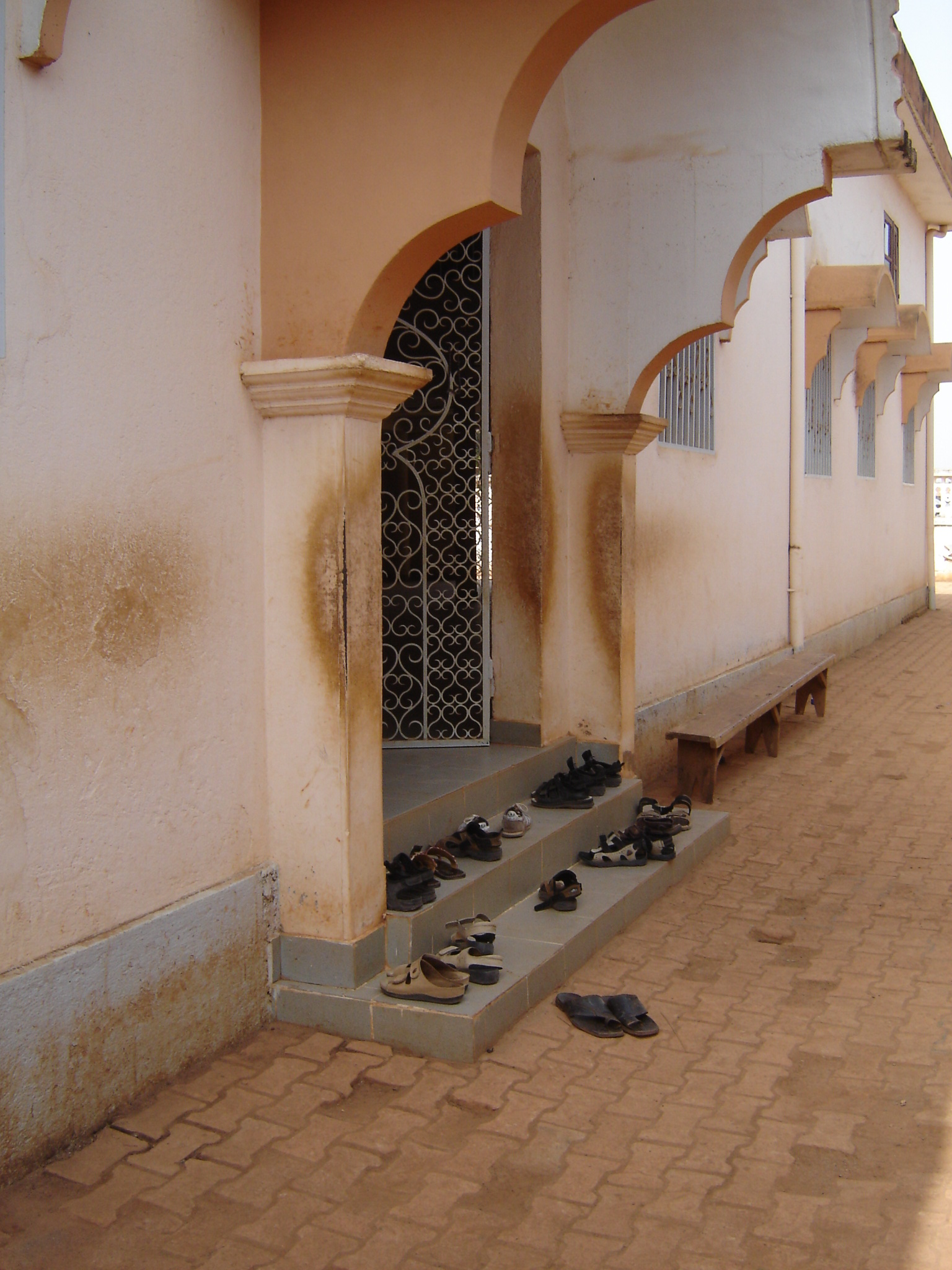 Foumban Mosque